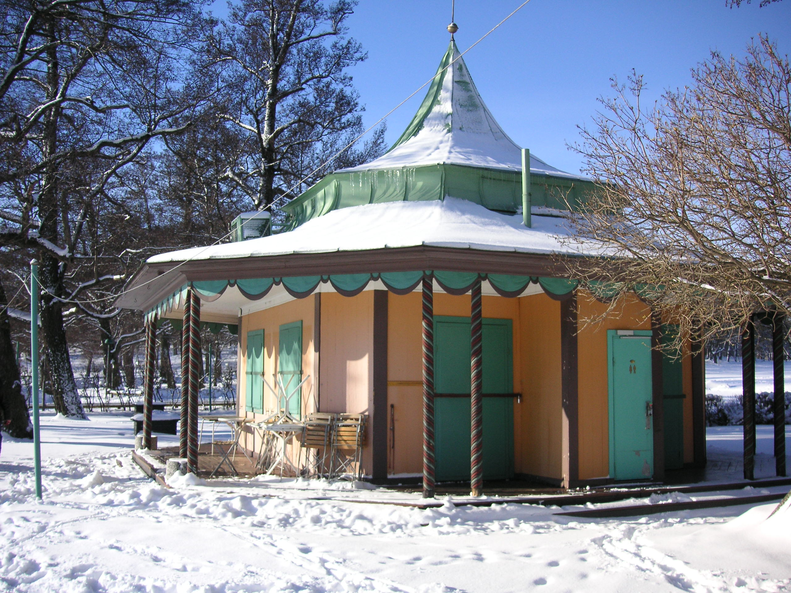 Biskopsudden på Djurården i Stockholm